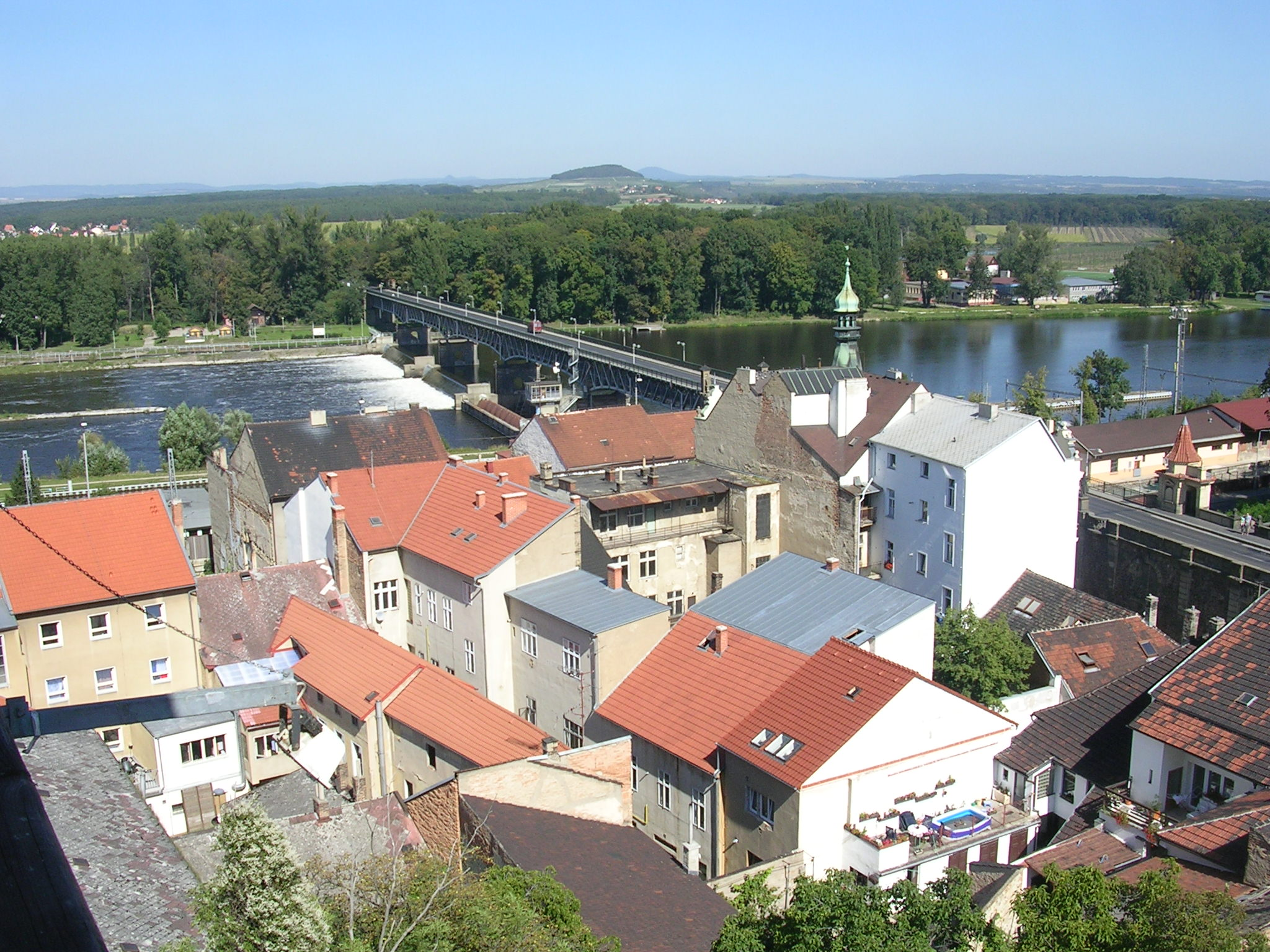 Roudnice nad Labem, most přes Labe. Pohled z městské hlásky.